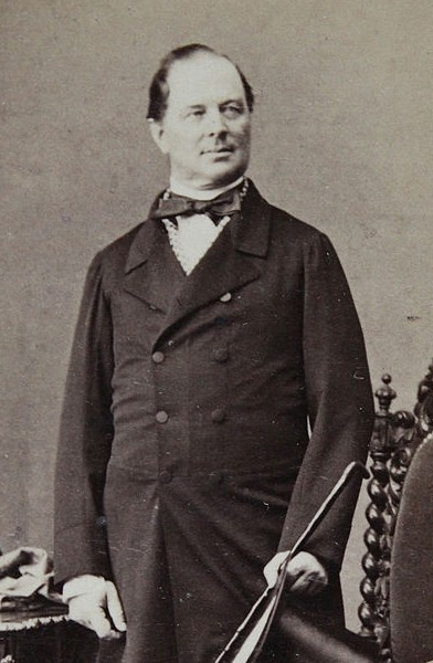 Rudolf Eugen Wrbna-Freudenthal (1813 - 1883), Rakouský šlechtic a politik.